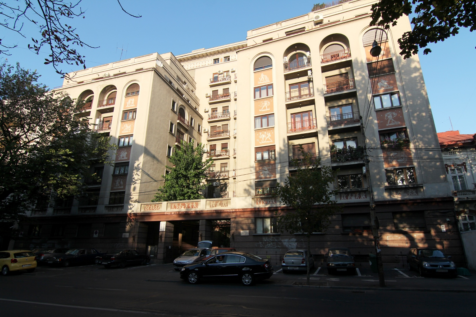 Blocul Zodiac